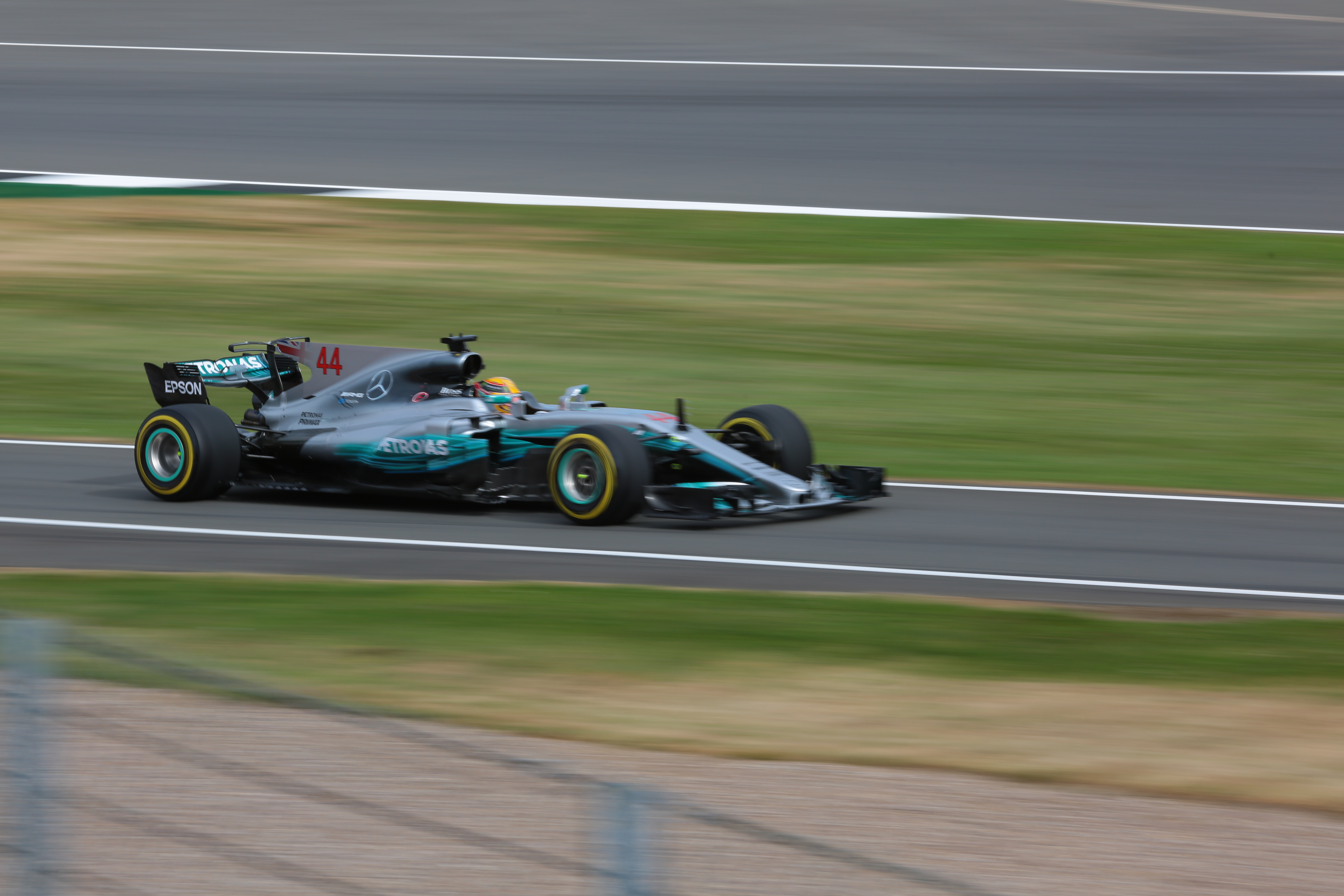 f1